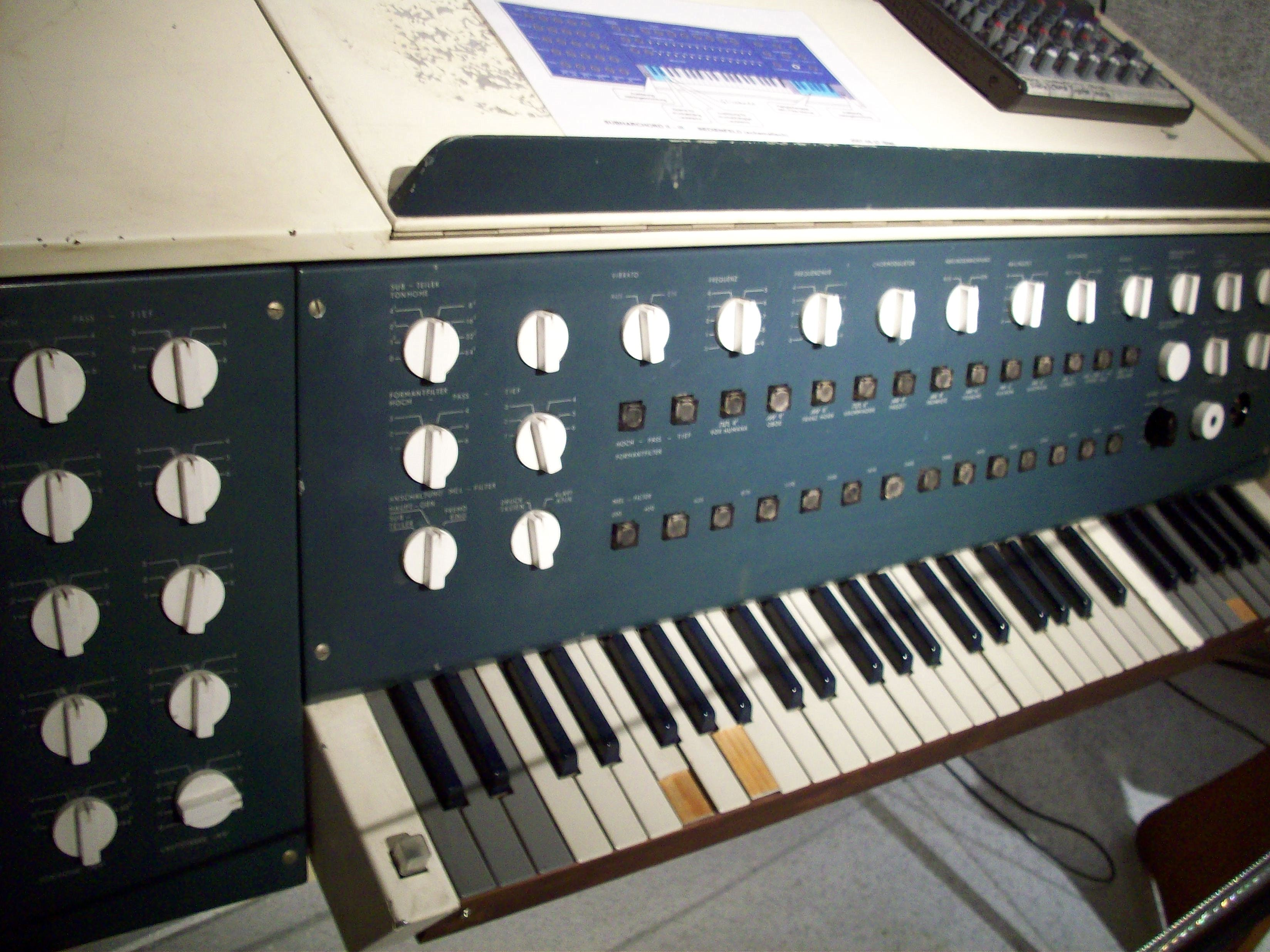 Subharchord II (Steinke, Gerhard / Schreiber, Ernst, Berlin 1959-1966) production: RFZ, East Berlin (GDR) 1968 lender: Jurai Duris, Bratislava (Slovakia) “Zaubethafte Klangmaschinen” Vergessene Zukunft #1 Kulturfabrik Hainburg 20.9.08 - 19.4.09 Arts Birthday 2009